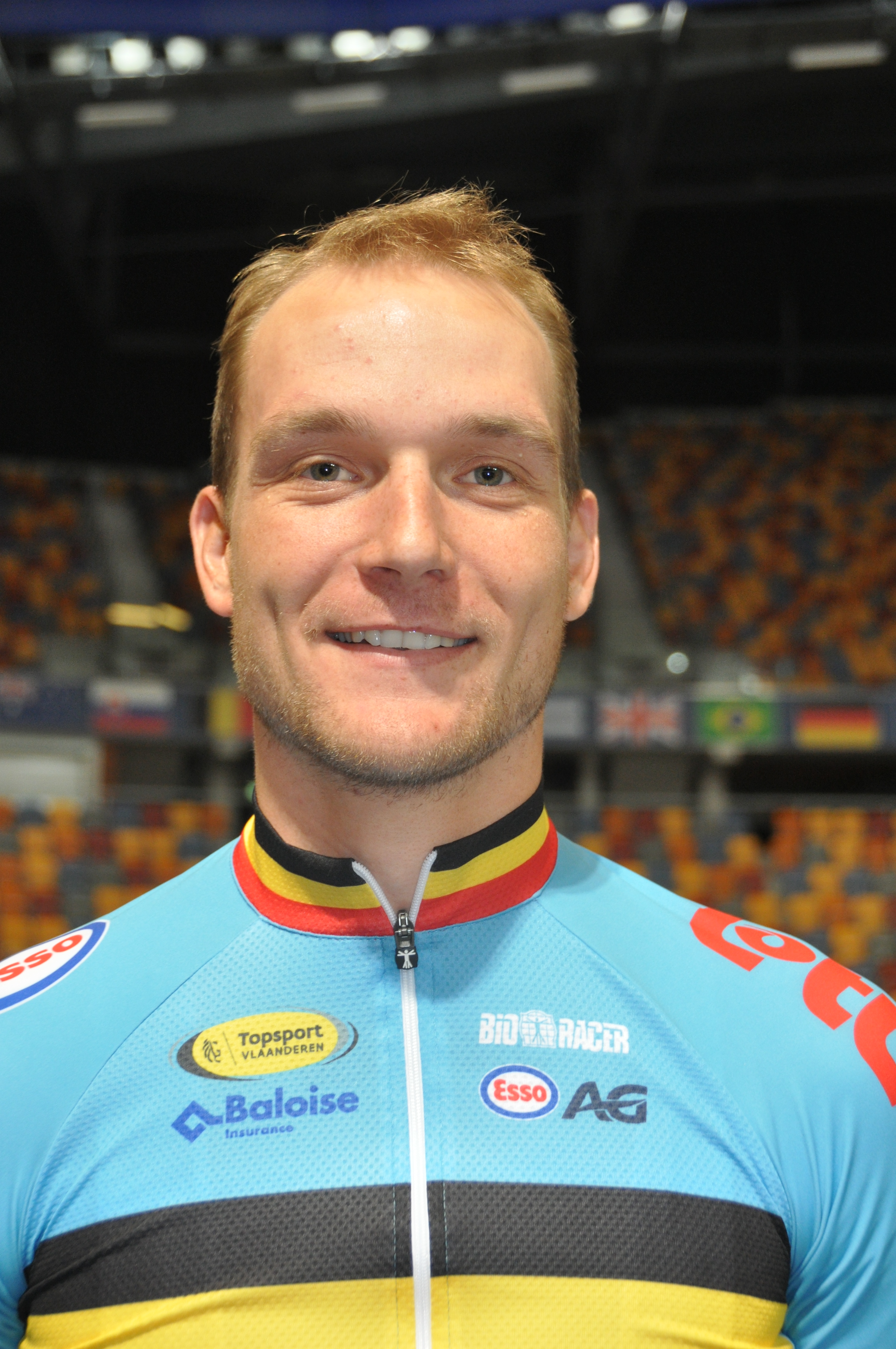 Jonas Rickaert, belgischer Radsportler